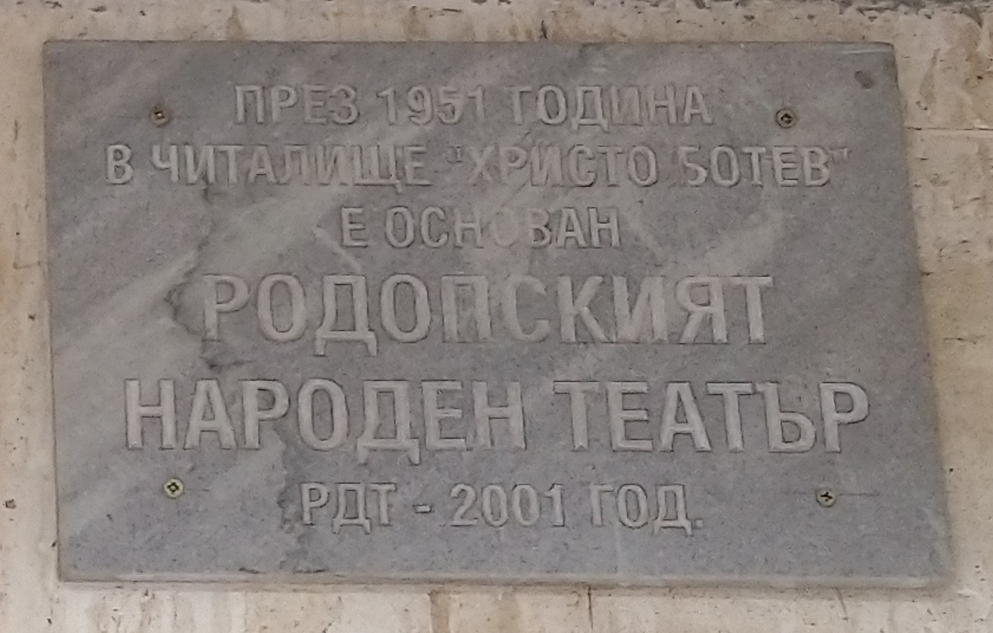 Смолян - читалище Христо Ботев - паметна плоча на Родопски народен театър